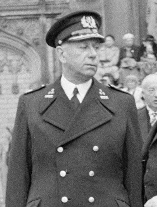 Collectie / Archief : Fotocollectie Van de Poll Reportage / Serie : Troonsafstand koningin Wilhelmina / Inhuldiging van koningin Juliana Beschrijving : De Amsterdamse hoofdcommissaris van politie Kaasjager (midden links) en commissaris Jutte van de Centrale Recherche droegen een zware verantwoording voor afzetting en veiligheid. Datum : 6 september 1948 Locatie : Amsterdam, Noord-Holland Trefwoorden : autoriteiten, inhuldigingen, koninklijk huis, officieren, politie Persoonsnaam : Jutte, Kaasjager, H. Fotograaf : Poll, Willem van de Auteursrechthebbende : Nationaal Archief Materiaalsoort : Negatief (zwart/wit) Nummer archiefinventaris : bekijk toegang 2.24.14.02 Bestanddeelnummer : 255-7044